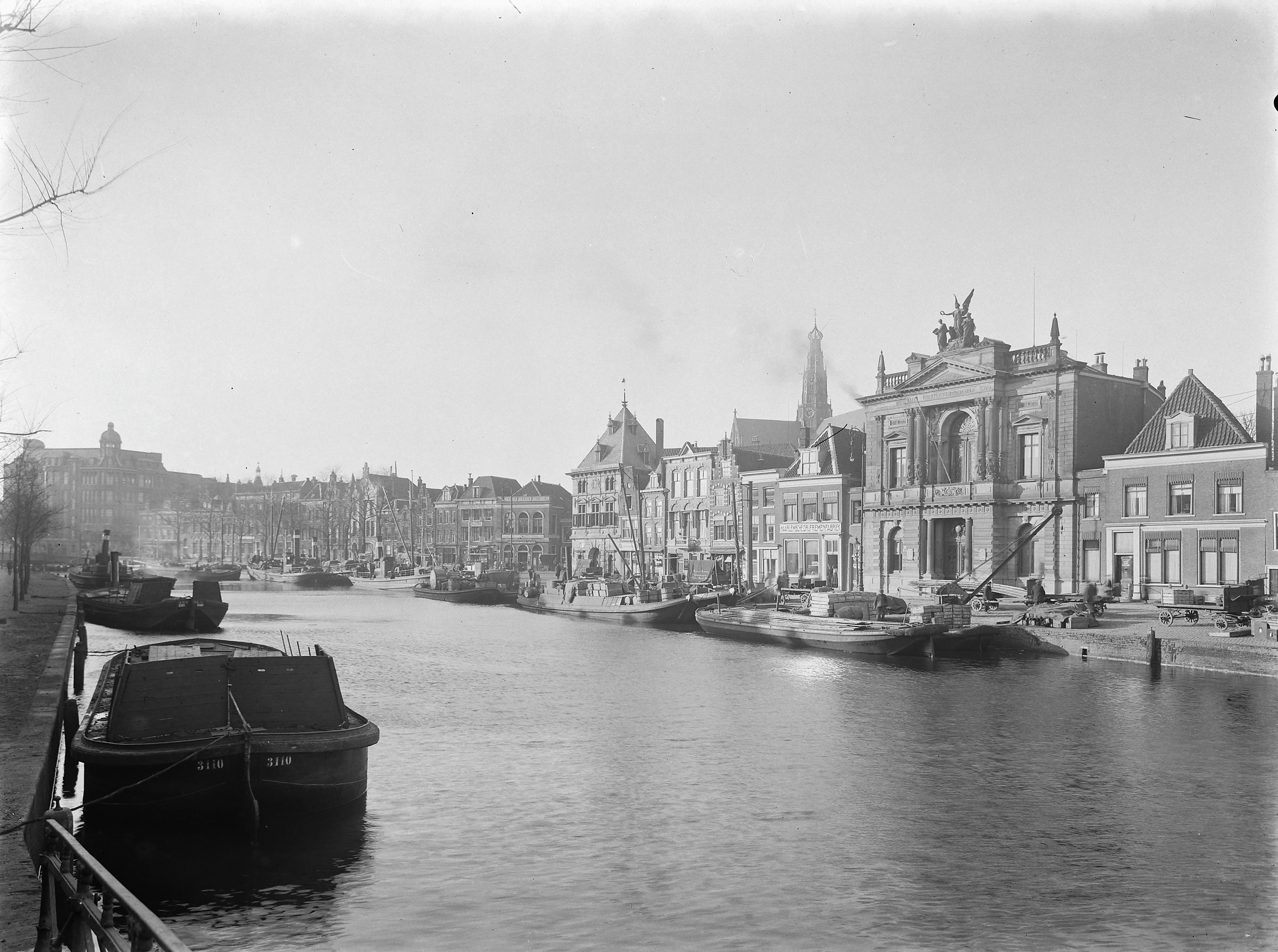 Teylers Museum: Gezicht op het Spaarne vanuit het oosten, met rechts het Teylers Museum (opmerking: In: Buiten ; 18 (1924), nr. 41, p. 484)